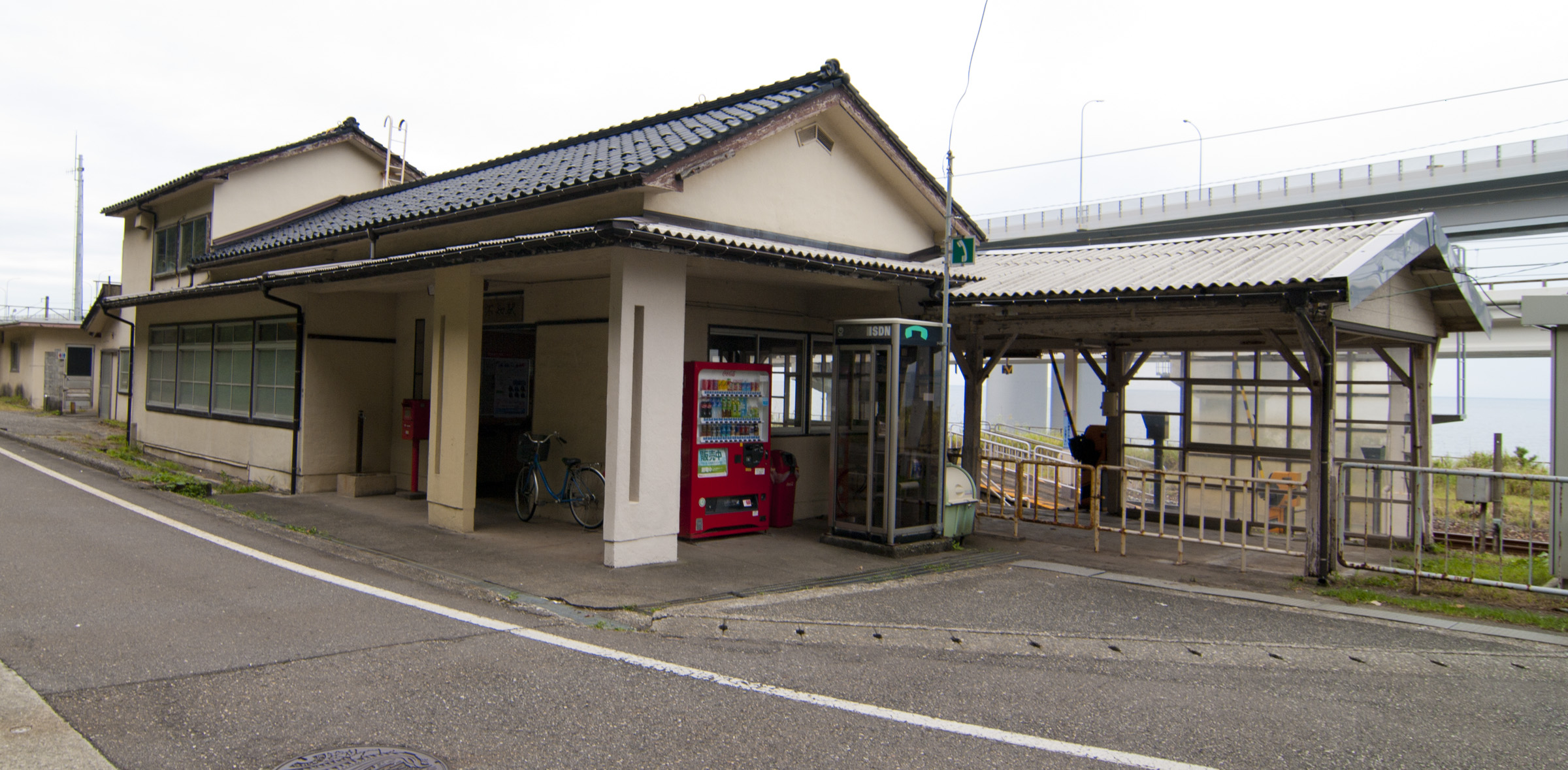 西日本旅客鉄道株式会社北陸本線親不知駅